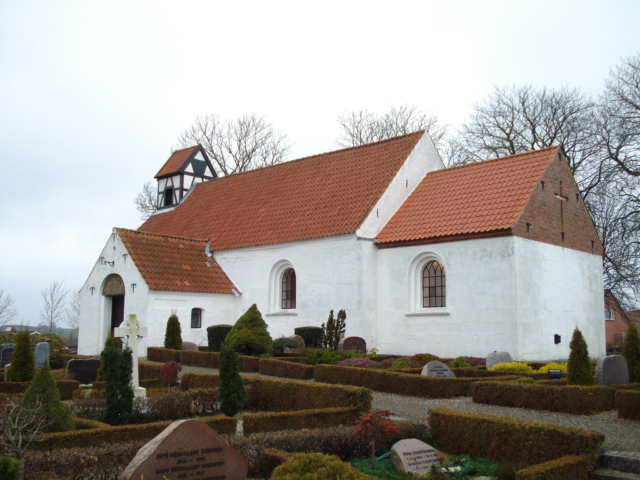 Vitved Kirke / Vitved Church, Jutland, Denmark